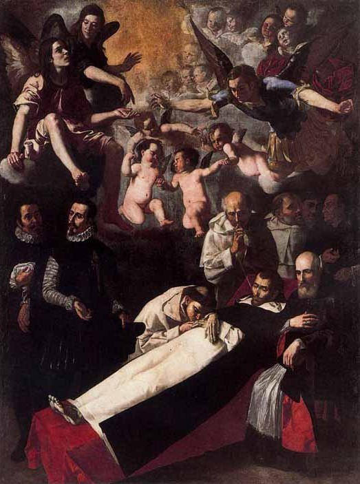 La obra representa la muerte del religioso dominico San Luis Beltrán (1526-1581), y a la izquierda del enfermo y con la mano puesta en su pecho aparece el prelado San Juan de Ribera.